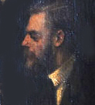 detail: Wilhelm August Stryowski